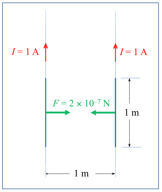 Amperearen definiziorako elementuen eskema grafikoa.